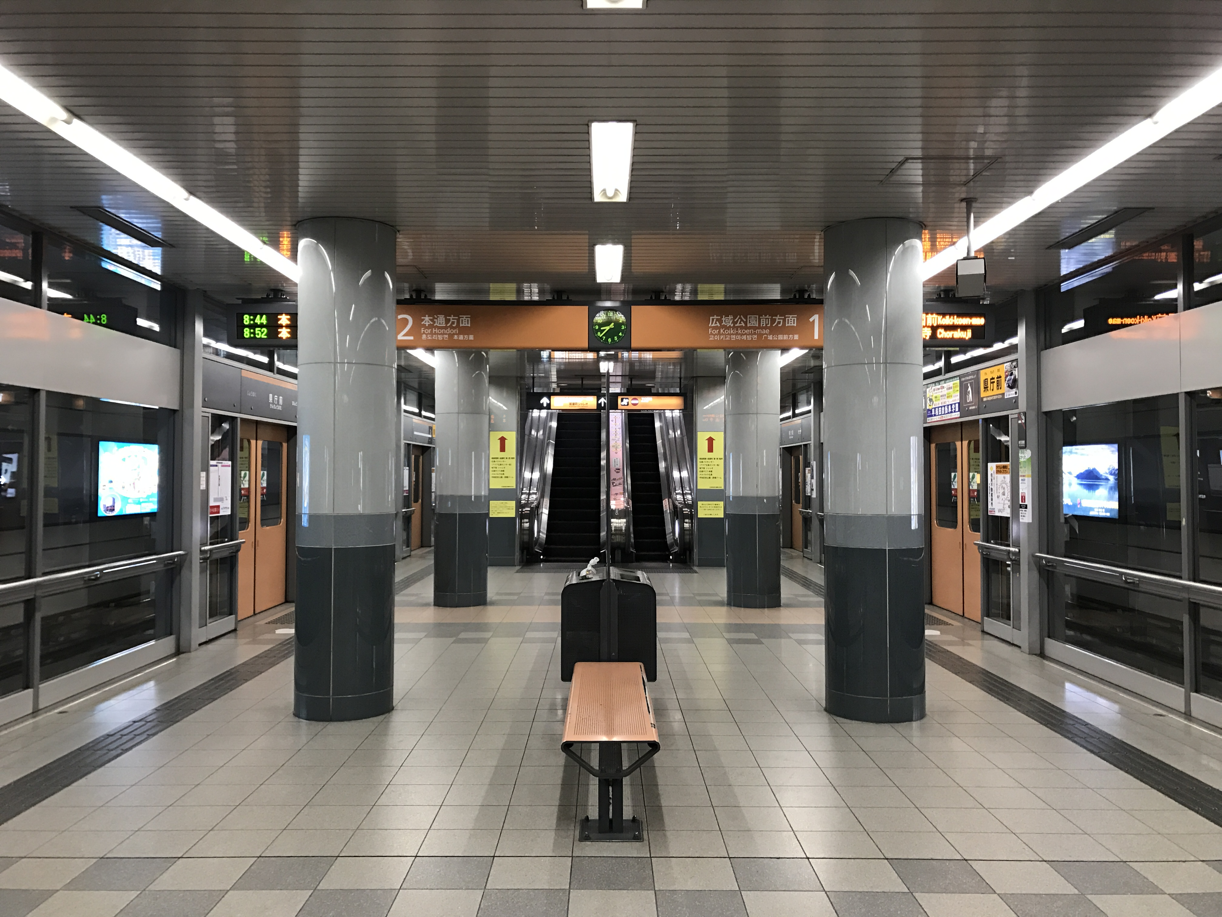 県庁前駅(広島県)のホーム(奥は本通り方面)